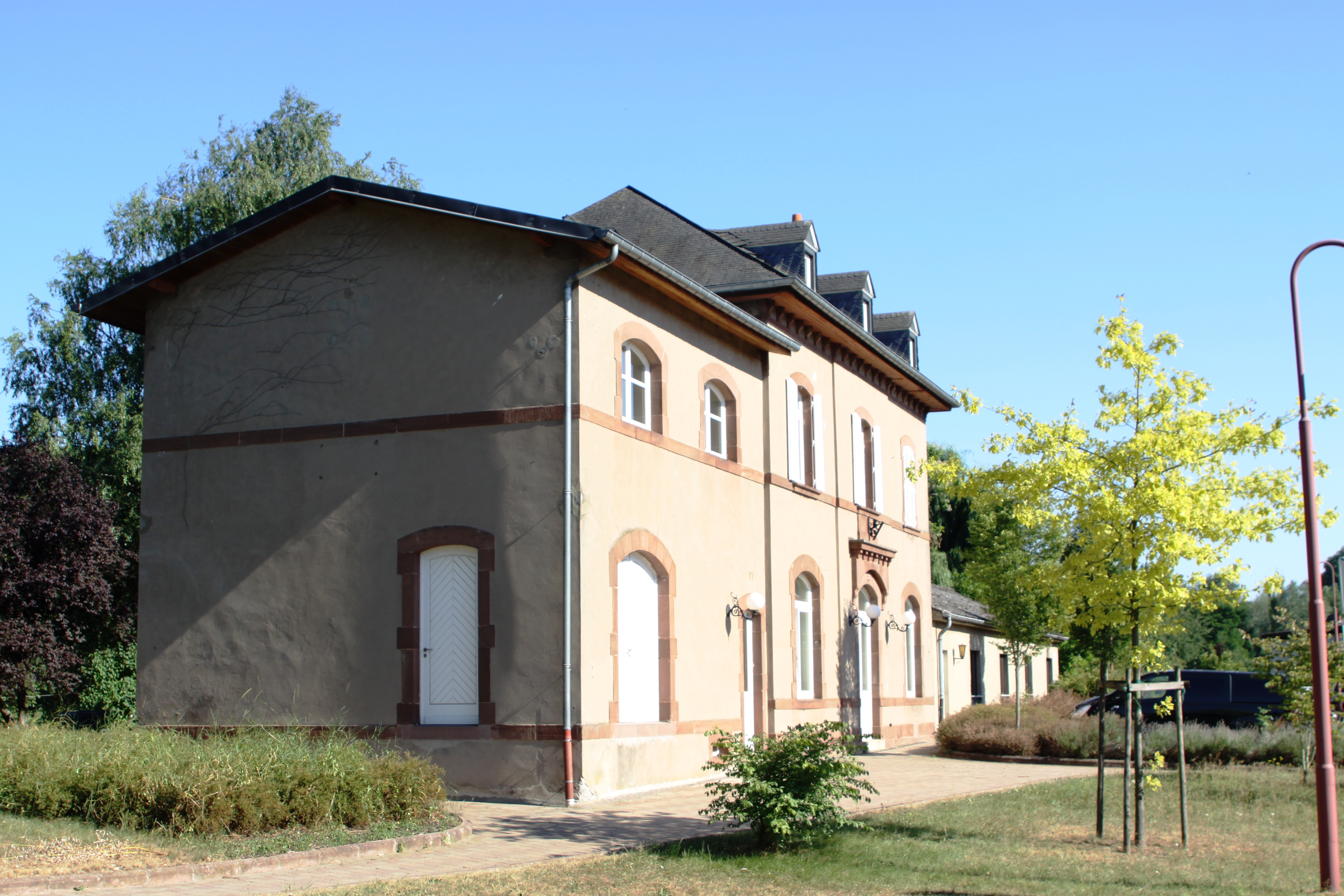 D'Gare vu Rouspert am Juli 2010.